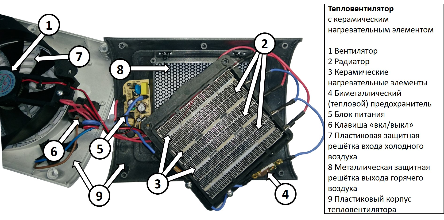 Устройство керамического тепловентилятора с расшифровкой элементов